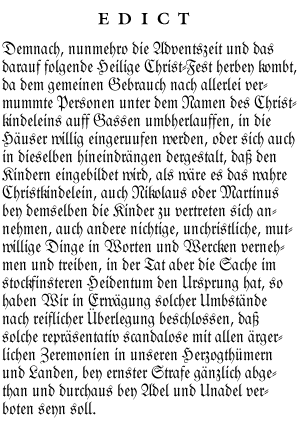 Edikt des Herzogs Gustav Adolf vom 28. November 1682